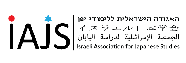 לוגו האגודה הישראלית ללימודי יפן